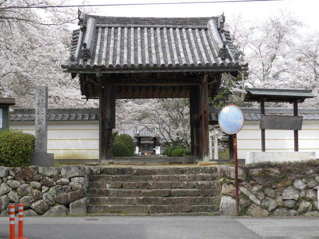 世尊寺の山門、国の史跡「比曽寺跡」。